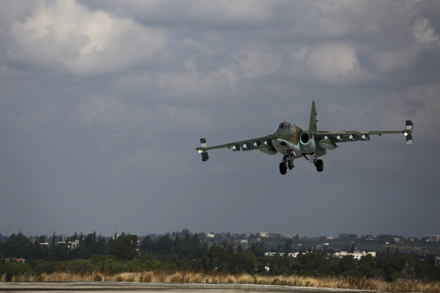 Боевая работа российской авиации в Сирии